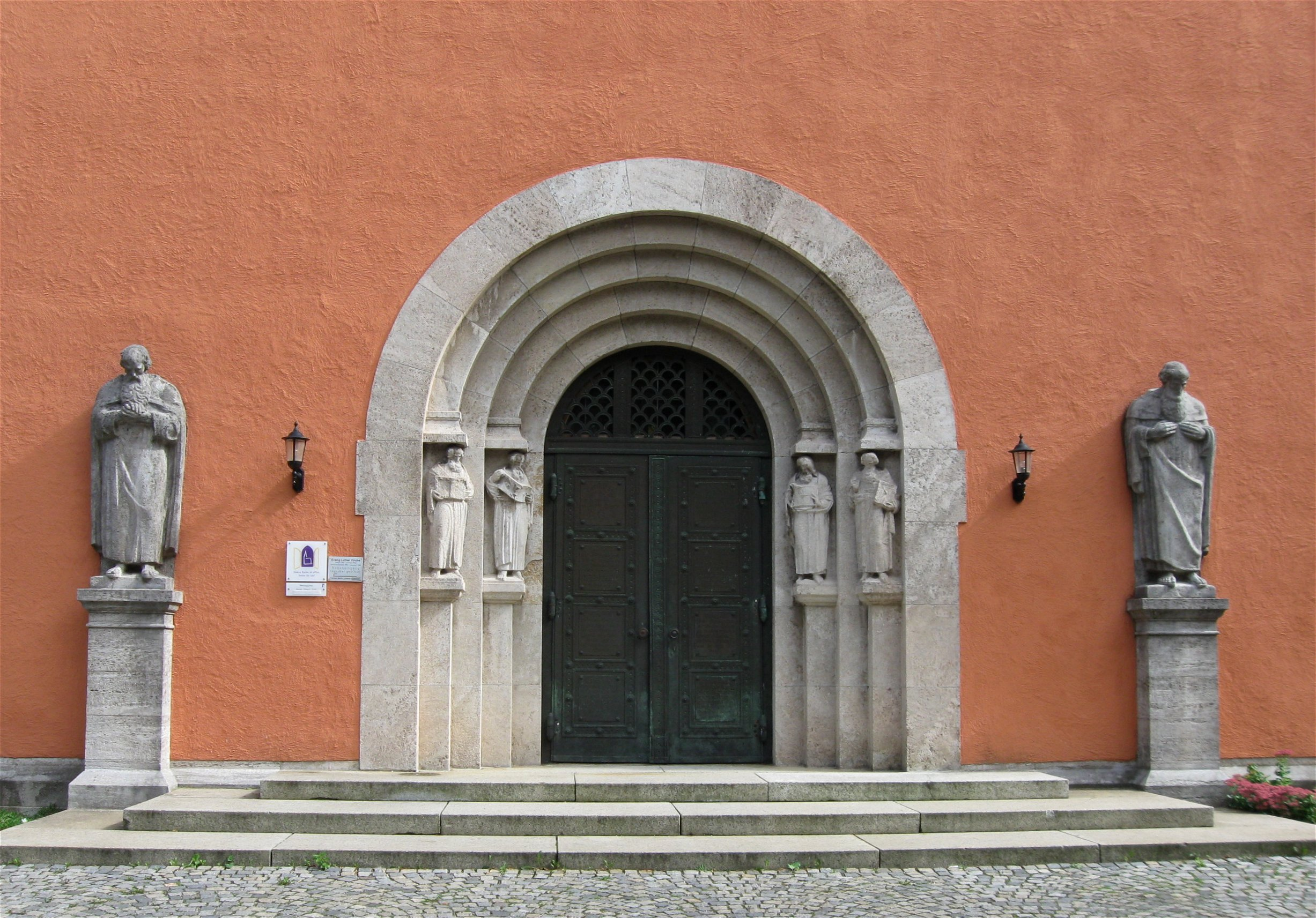 Martin-Luther-Straße 4; Evang.-Luth. Lutherkirche samt Pfarrhaus, Baugruppe mit Turm, historische Anklänge, 1926–27 von Hans Grässel; städtebauliches Pendant zur Hl. Kreuz Kirche Giesing (siehe Ichostraße 1).